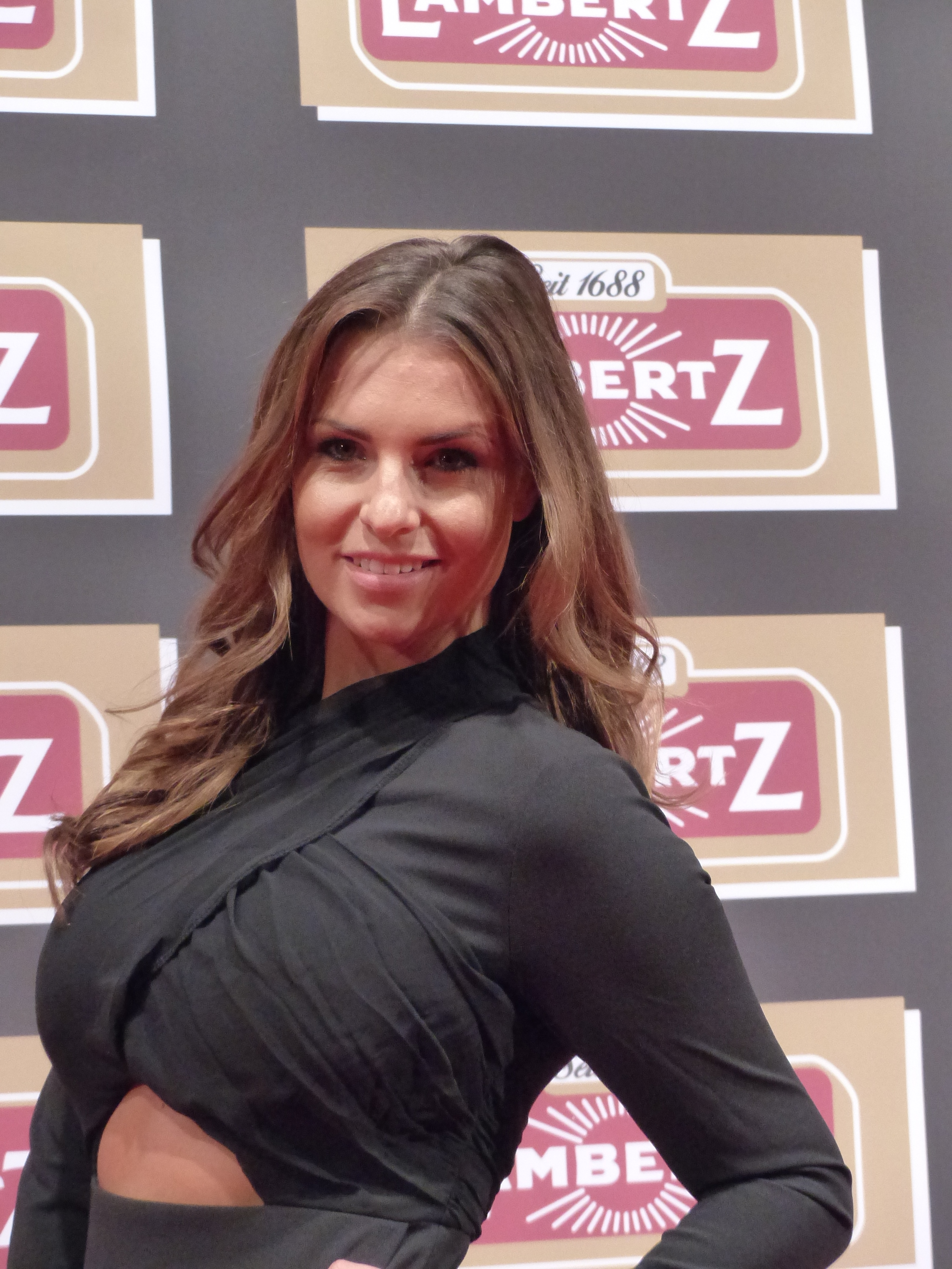 Laura Wontorra bei der Lambertz Monday Night, im Februar 2016.